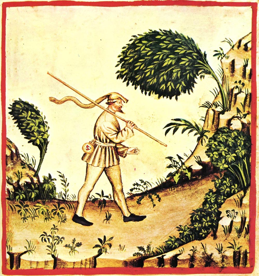 33-vento orientale, Taccuino Sanitatis, Casanatense 4182